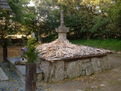 源義朝の墓 Grave of Minamoto no Yoshitomo, Ōmidōji, Mihama, Aichi, Japan 撮影日: 2003/02 (2003 Feb.) 撮影者: Andee 撮影場所:愛知県美浜町の野間大坊の境内